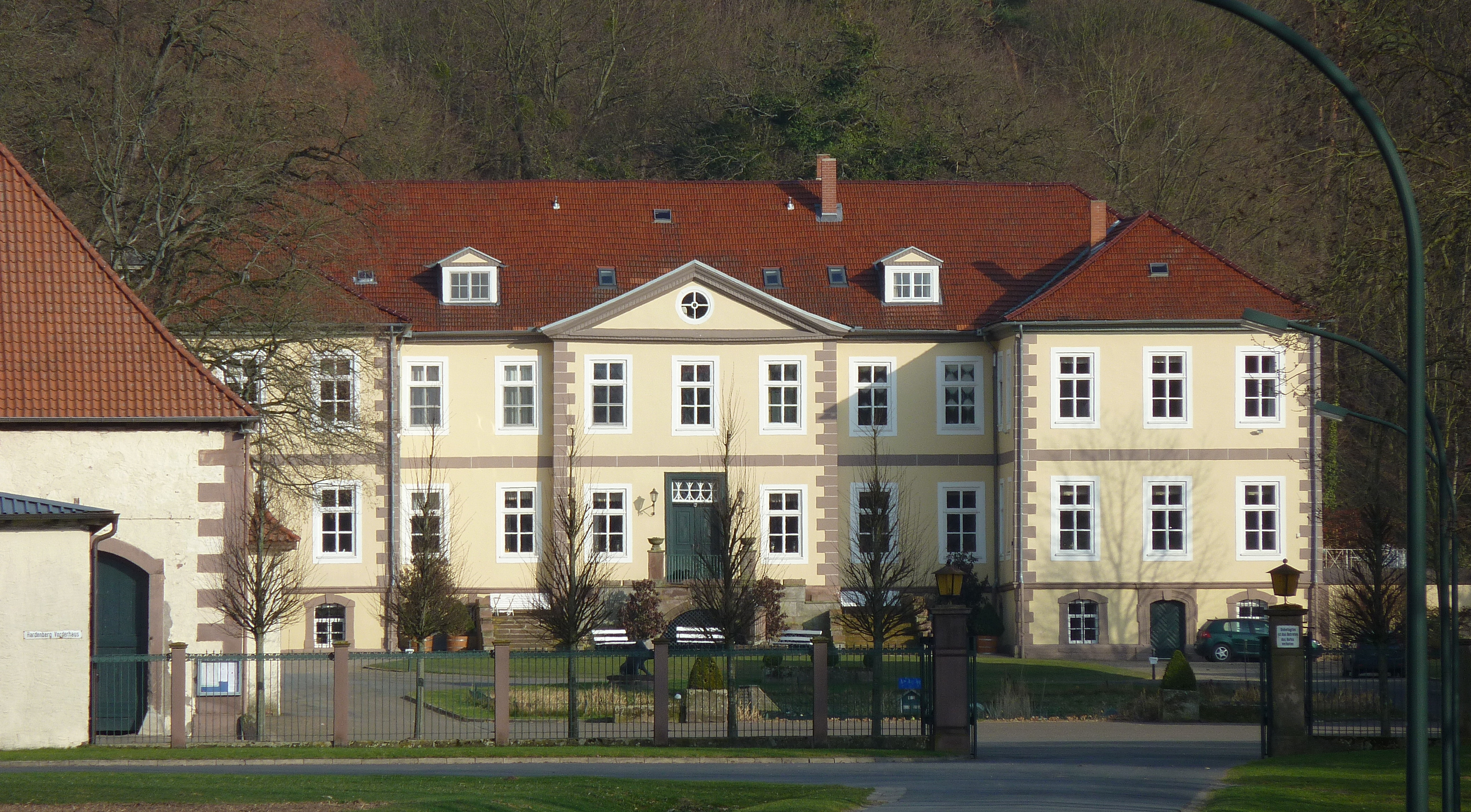 Westansicht des Schlosses Hardenberg (Vorderhaus) bei Nörten-Hardenberg, erbaut 1701-1710 durch Georg Sigismund Schmidt